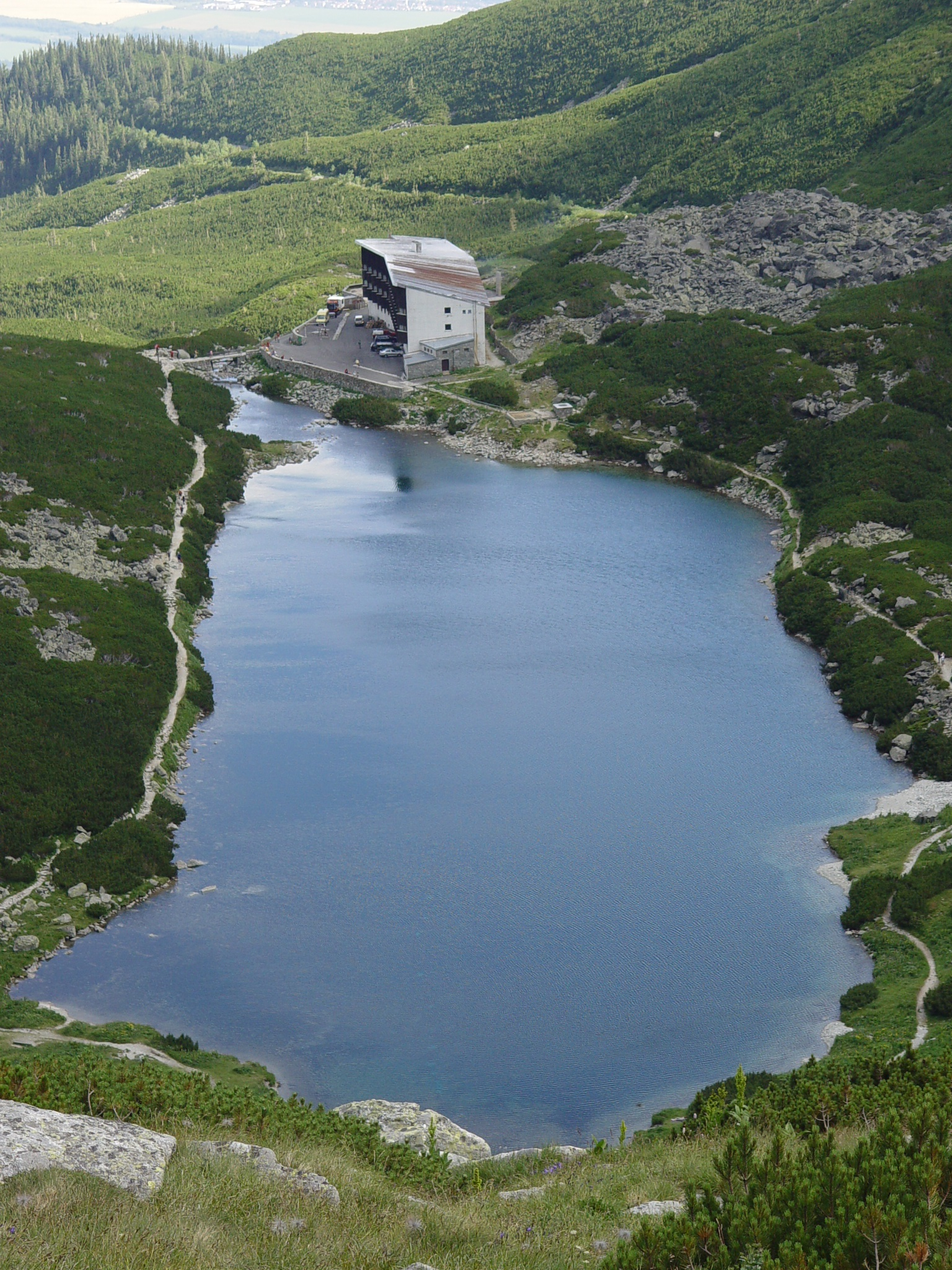 Magas-Tátra,_Lengyel-nyeregről_lefelé,_Felkai-völgy_A_Sziléziai_házzal_2